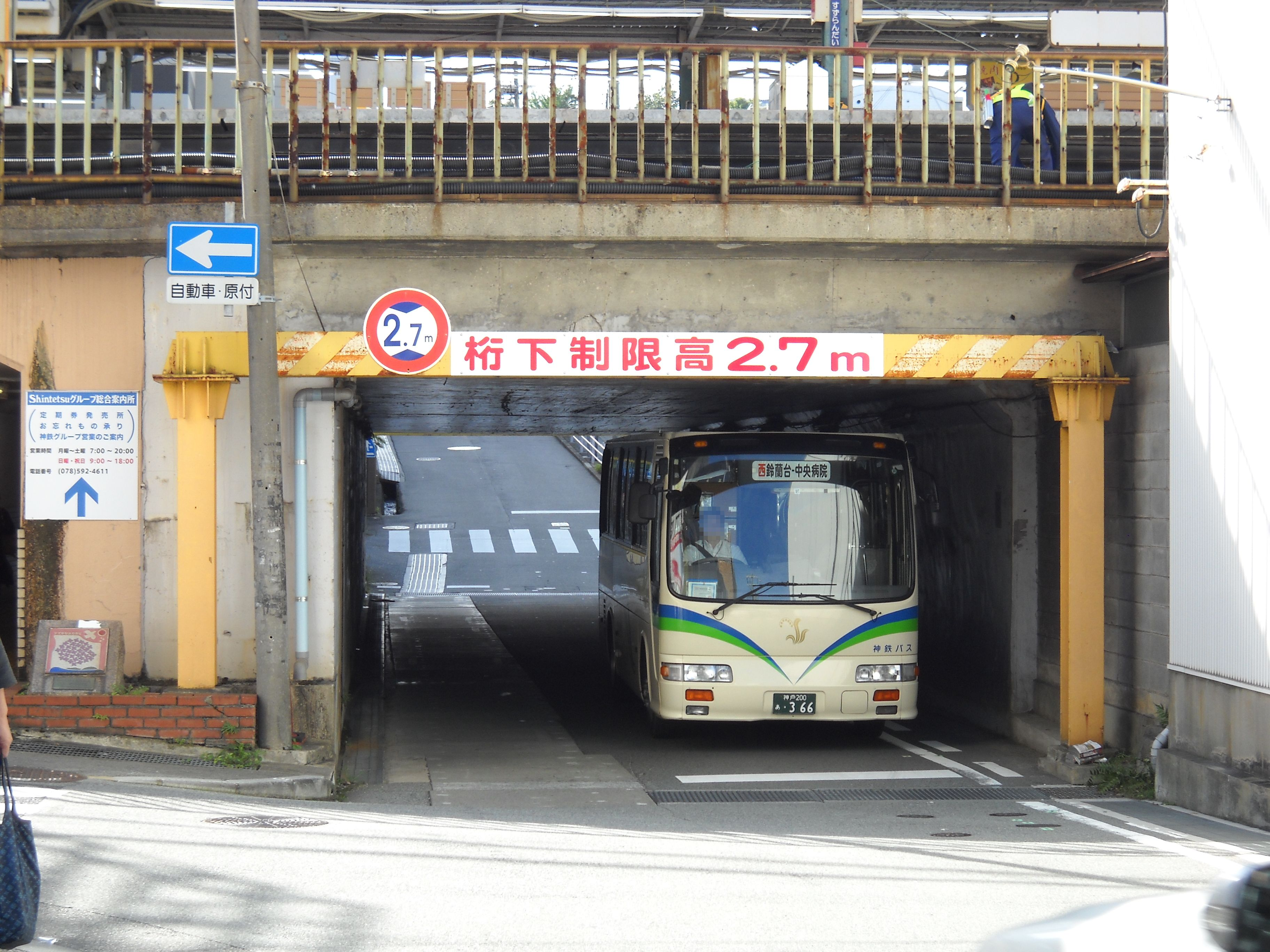 神戸電鉄鈴蘭台駅の高架下を通過する神鉄バスの中央病院行き。桁下制限高2.7ｍのために屋根を低くした車両が使用されている。